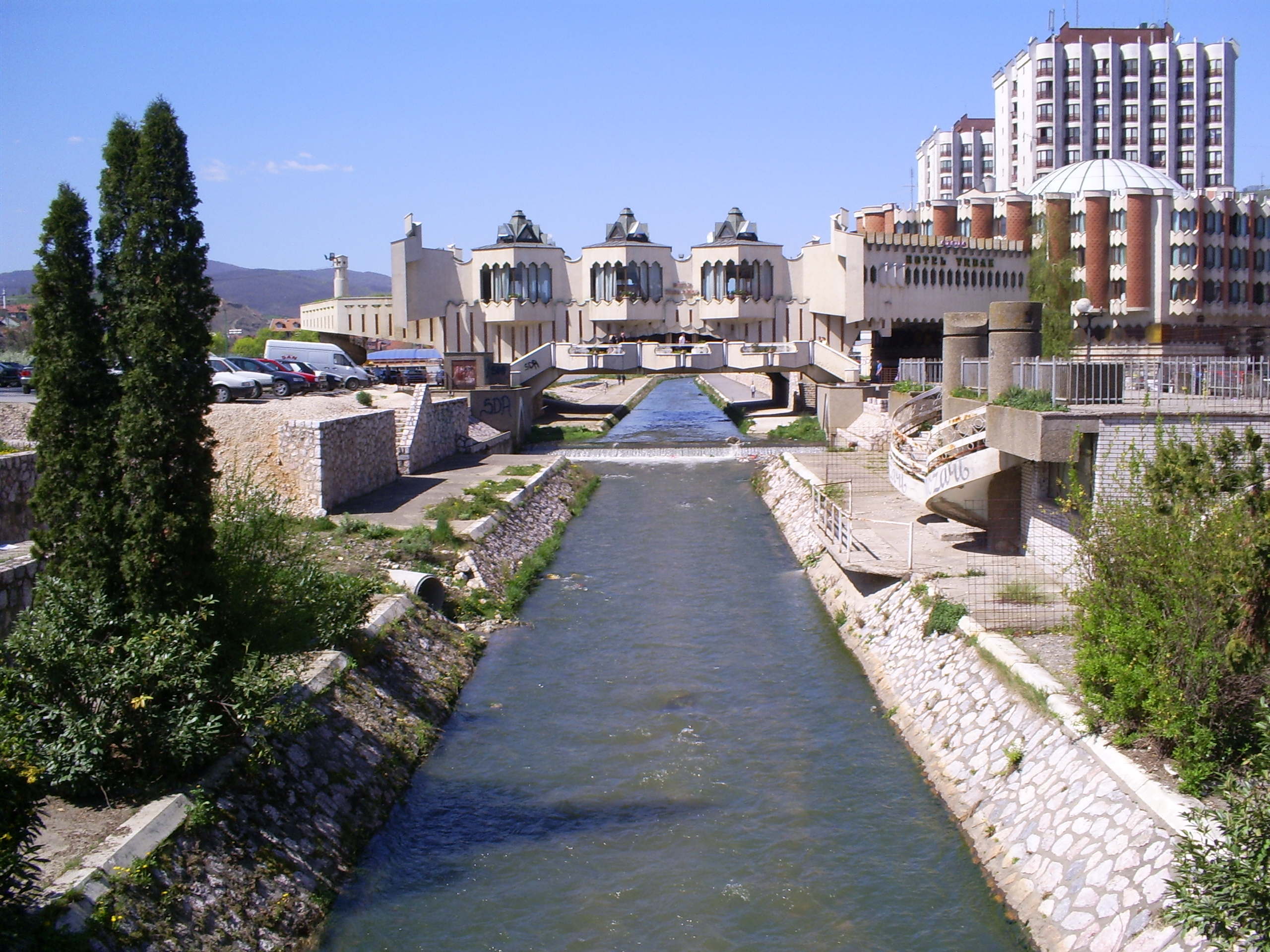 Reka Raska u Novom Pazaru